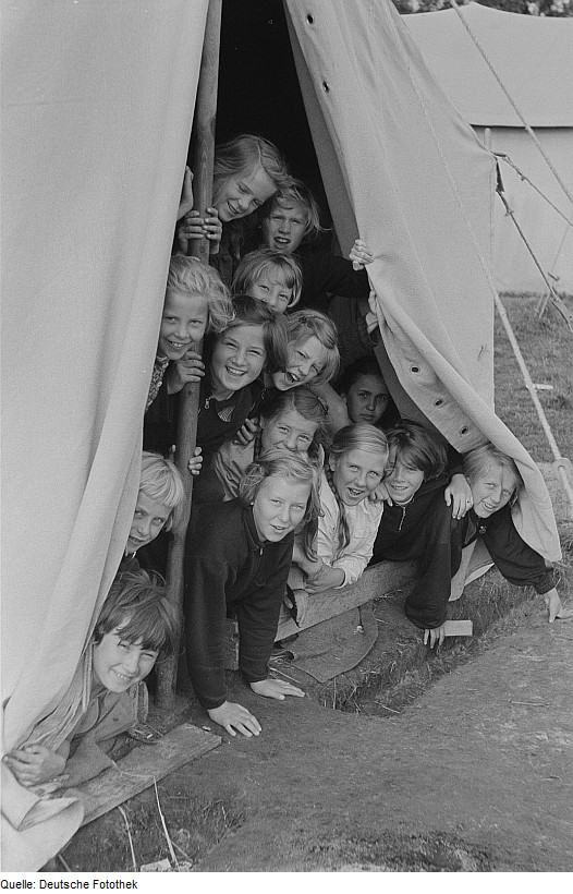 Original image description from the Deutsche Fotothek Mädchengruppe aus dem Zelteingang schauend